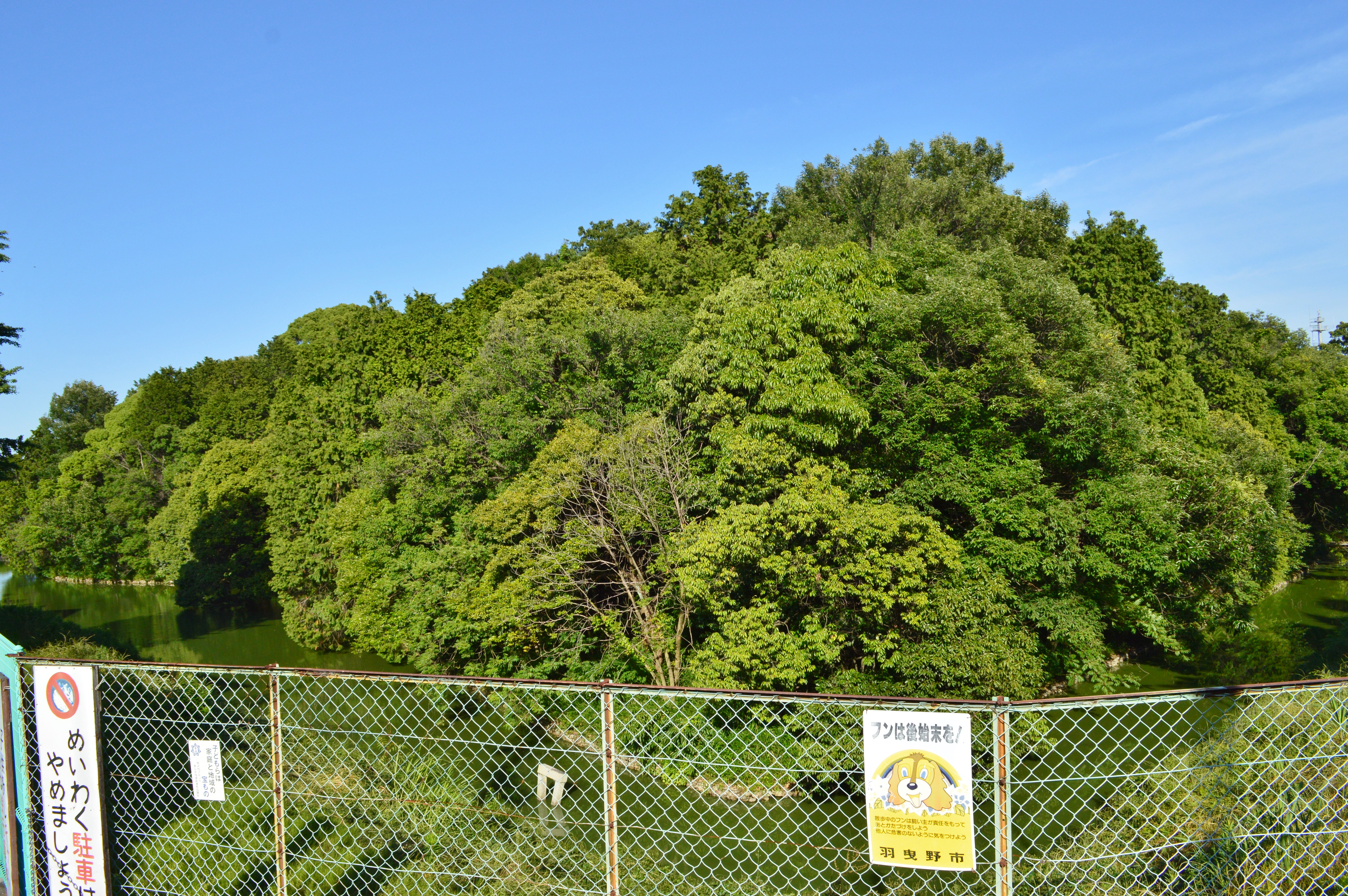 ボケ山古墳 墳丘と周濠